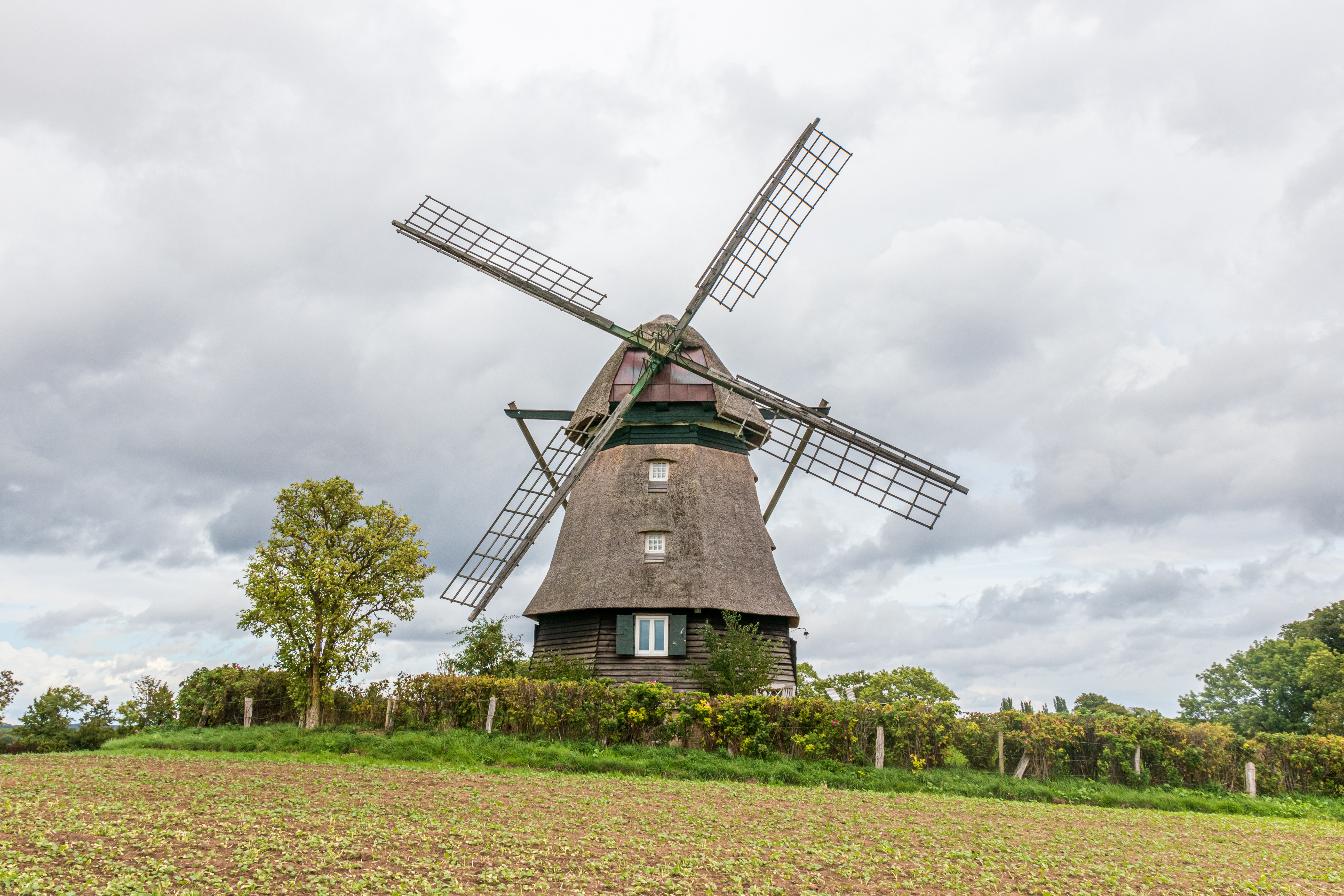 Die 1828 erbaute Farver Mühle